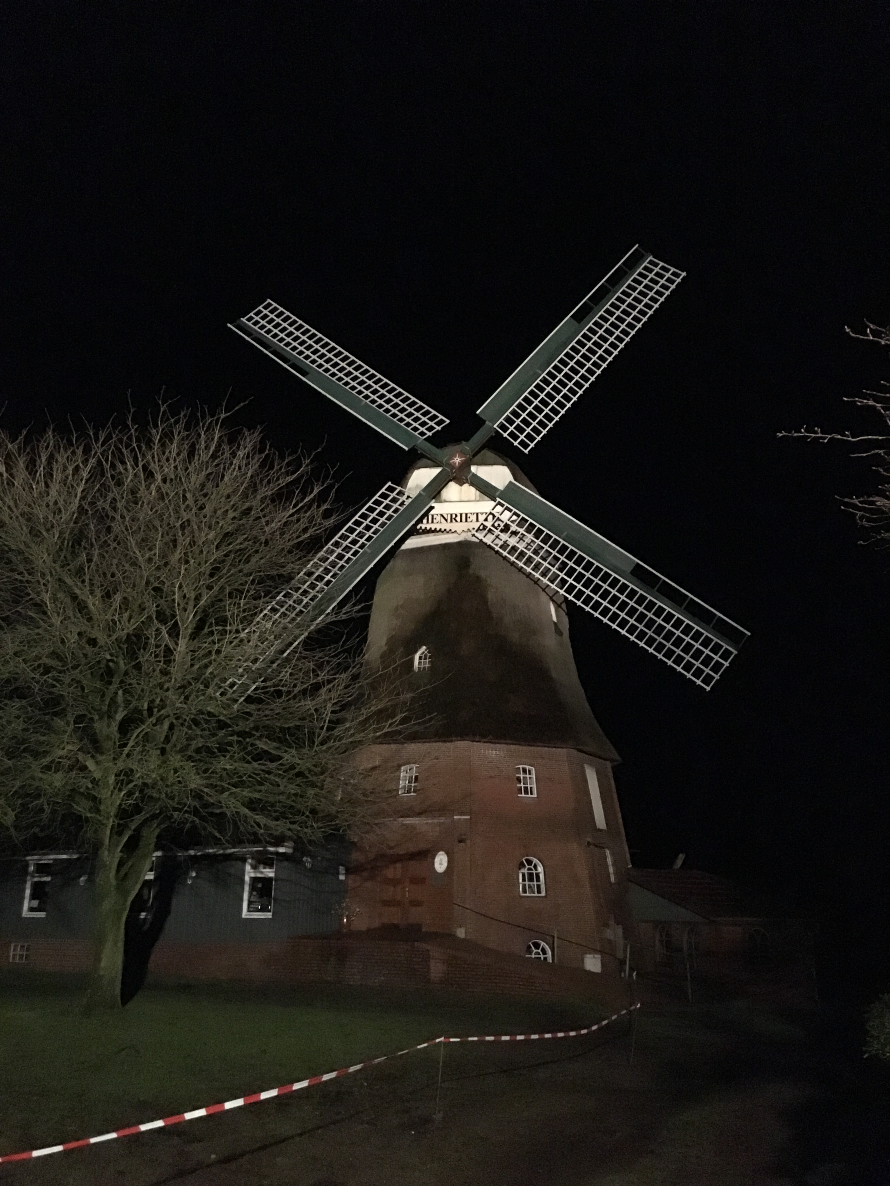 Möhl in Öölm in’n Düüstern